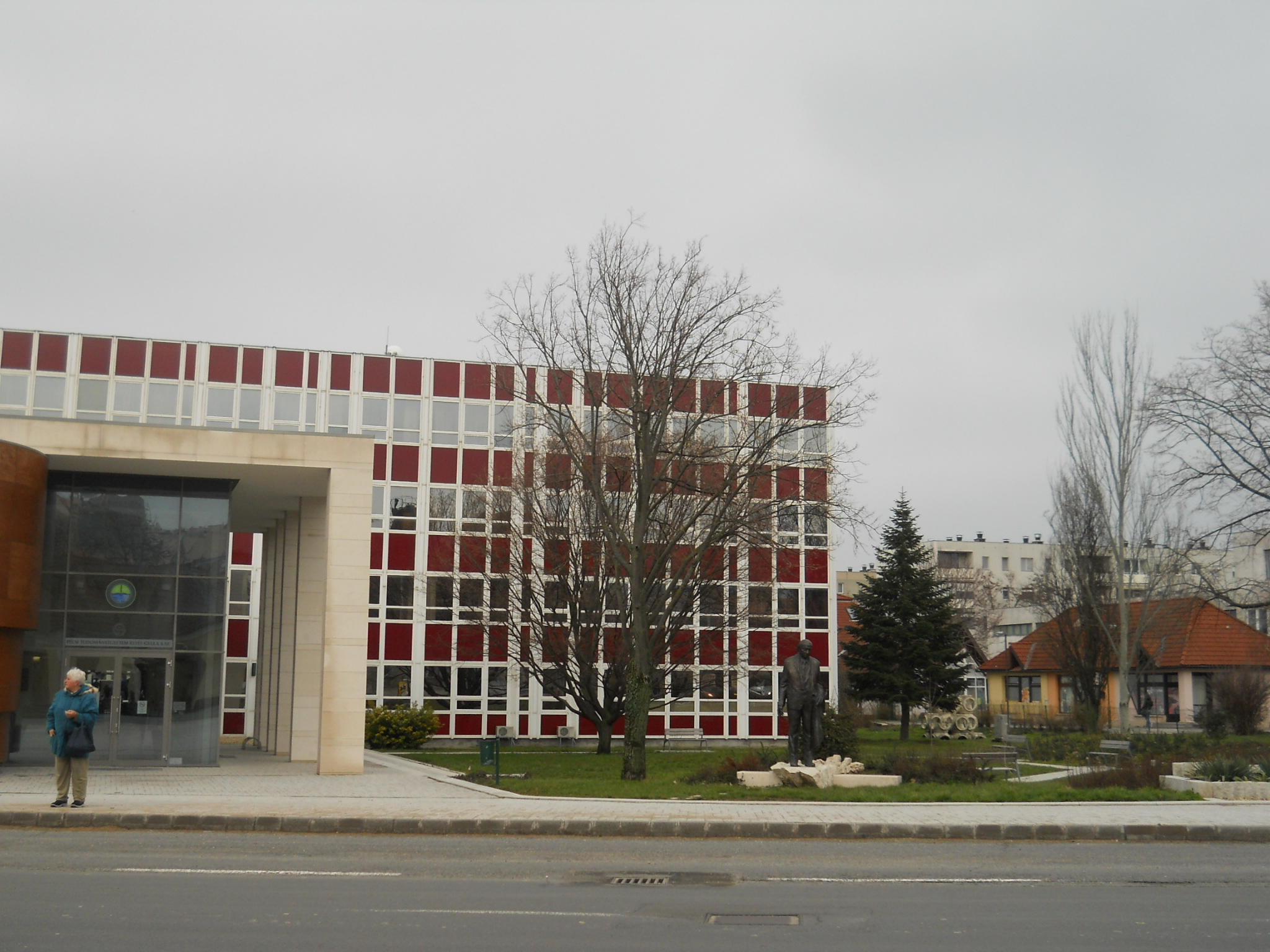 Szekszárd - PTE Illyés Gyula kar